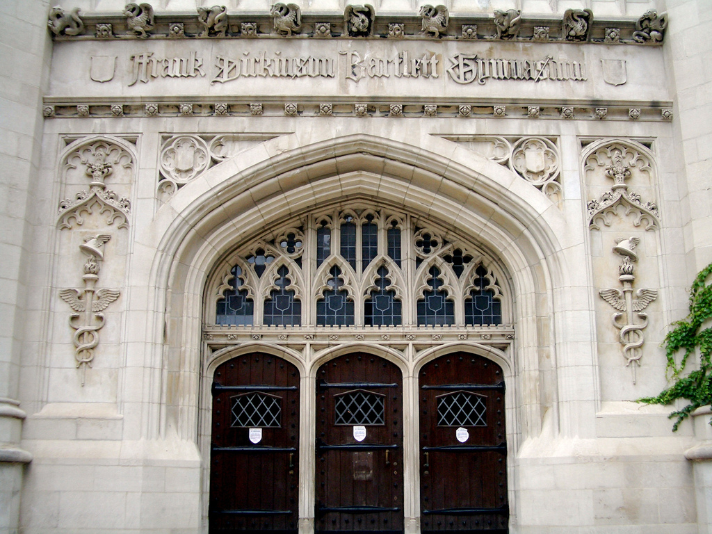 Bartlett Dining Hall